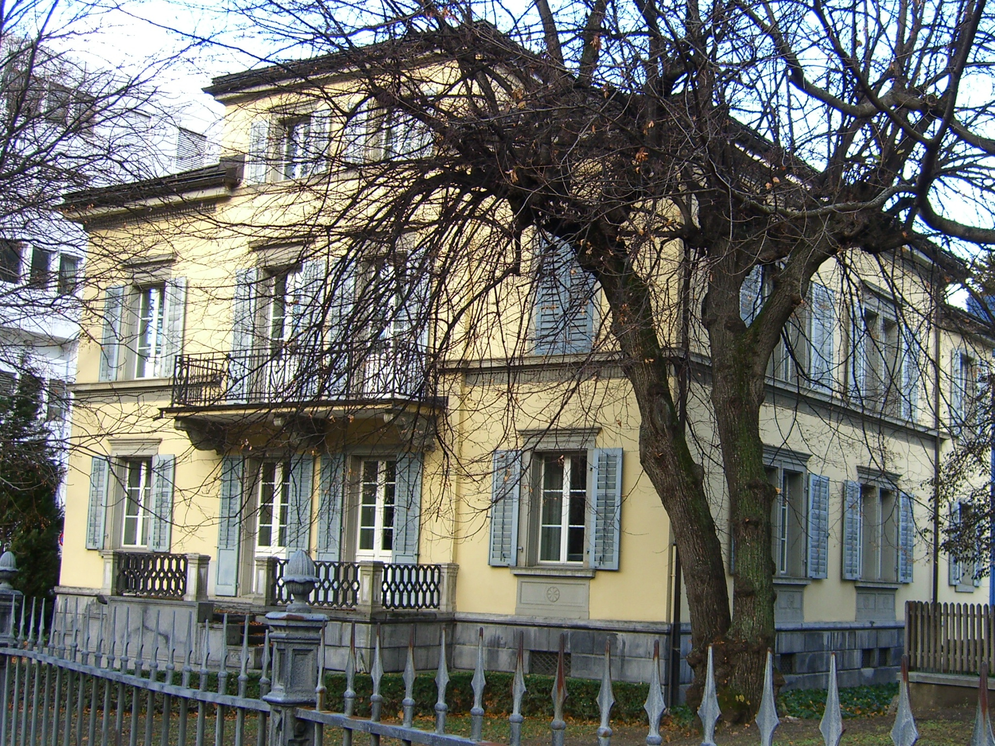 Geburtshaus von Prof. Kurt Huber in Chur/Schweiz, Mitglied der Weissen Rose.